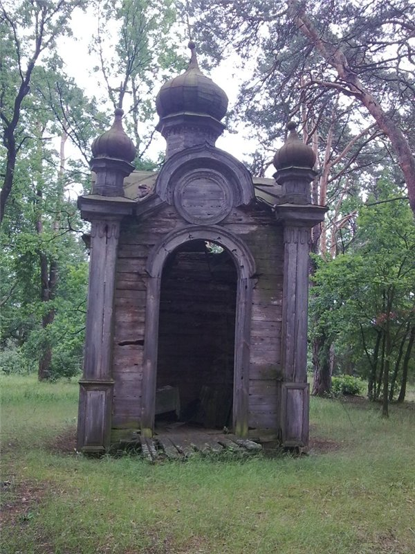 Ленін. Свята-Крыжаўзвіжанская капліца